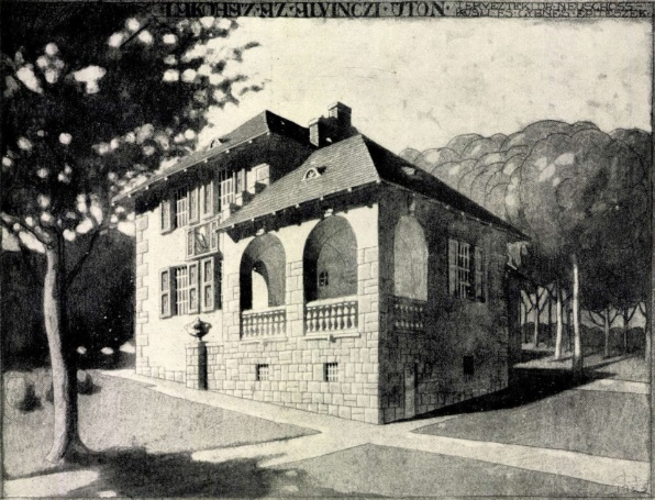 Lakóház az Alvinci úton. Gyenes Lajos és Dr. Neuschloss Kornél terve